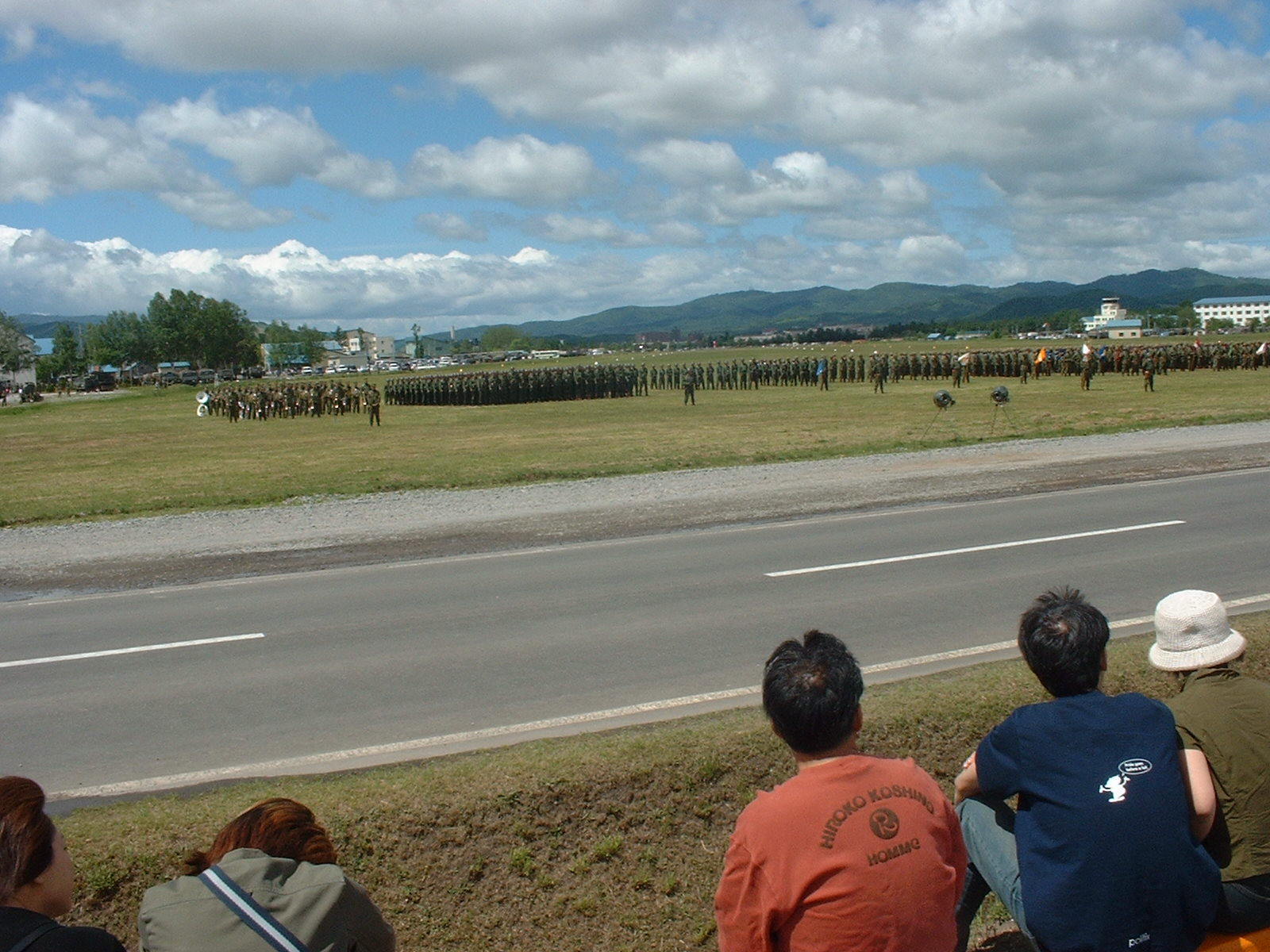 旭川駐屯地滑走路、自動車教習所コースより撮影